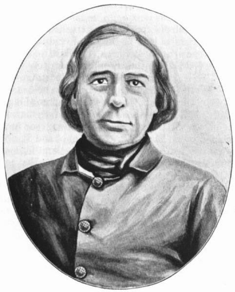 Portrait des Verler Bürgers Johannes Otto Bredeick. Er ist der Gründer der Stadt Delphos (Ohio, USA). Abfotografiert aus der St. John's Church in Delphos.